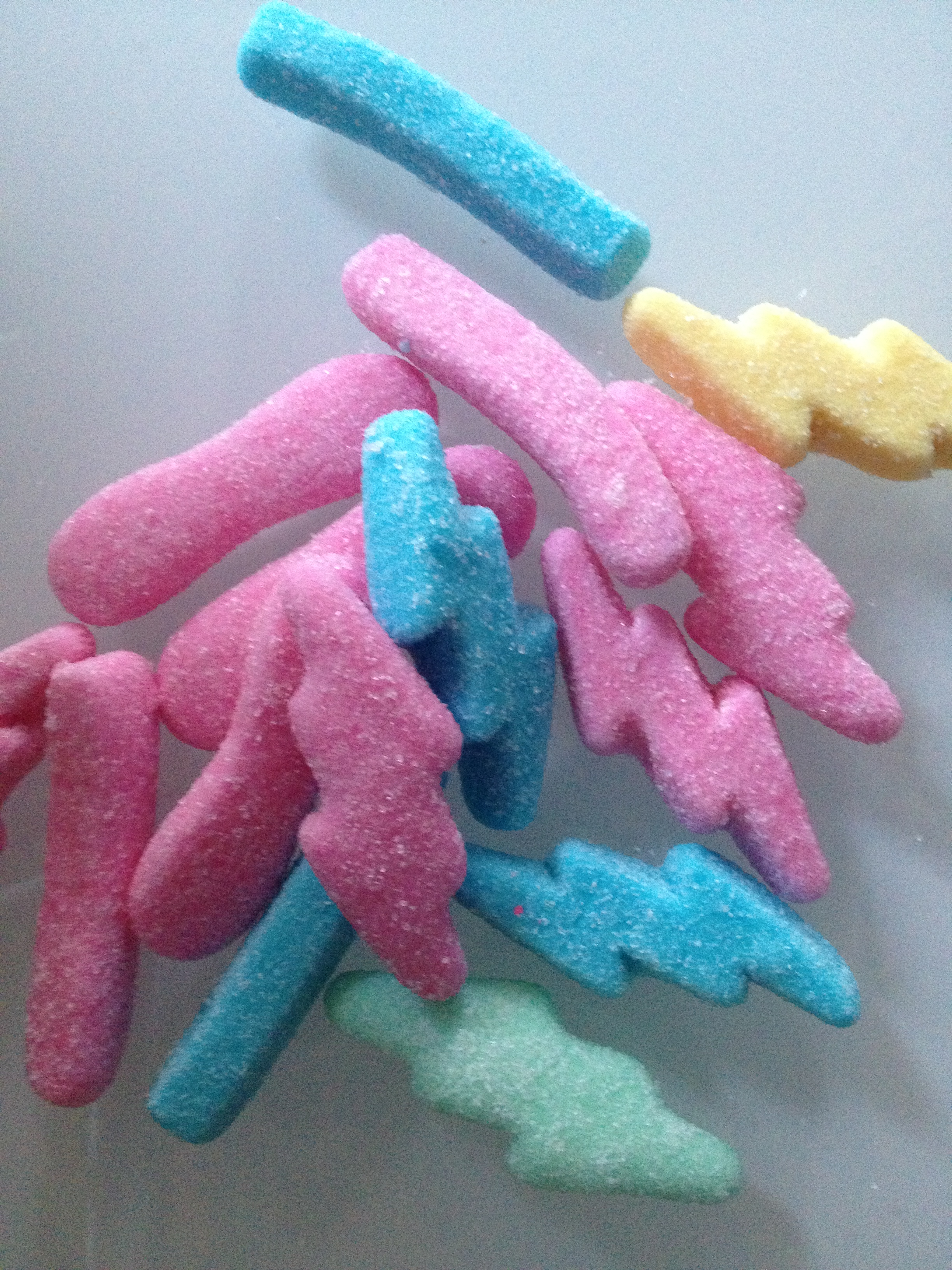 Bonbon Haribo moster pik